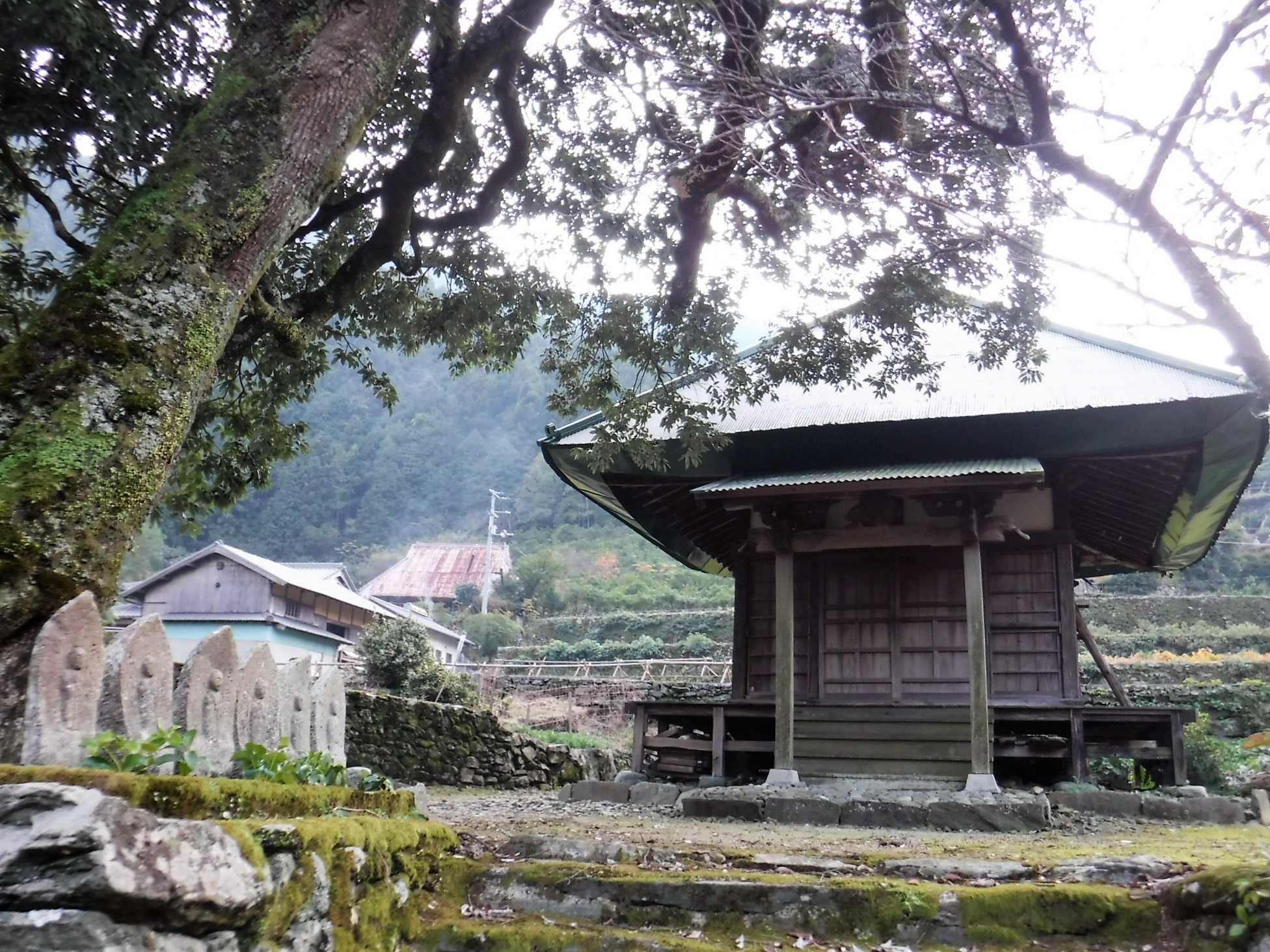 愛媛県西条市藤之石丙 下津池のお堂と六地蔵